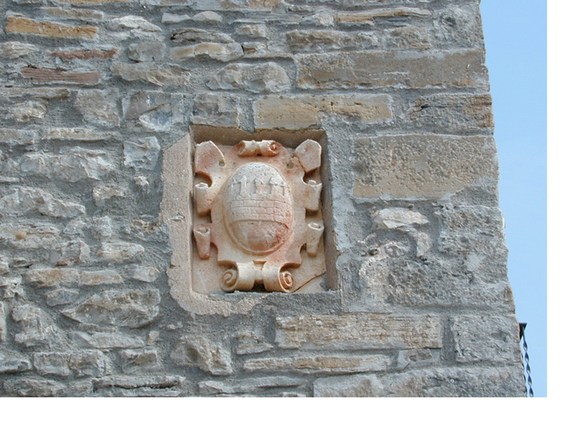 Escudo de la familia Mur encastrado en pared de piedra